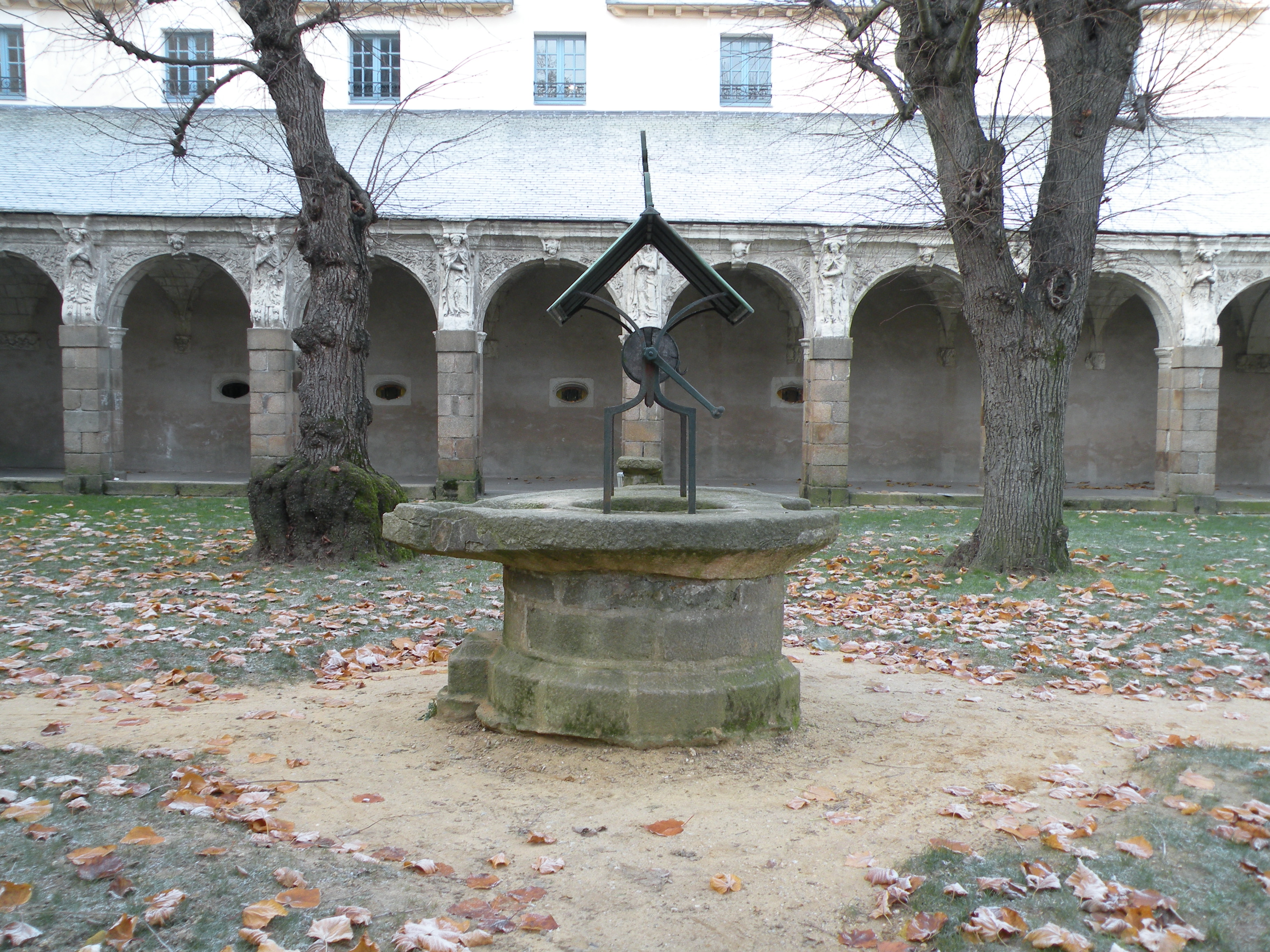 Cloître de l’ancienne abbaye Saint-Melaine à Rennes.